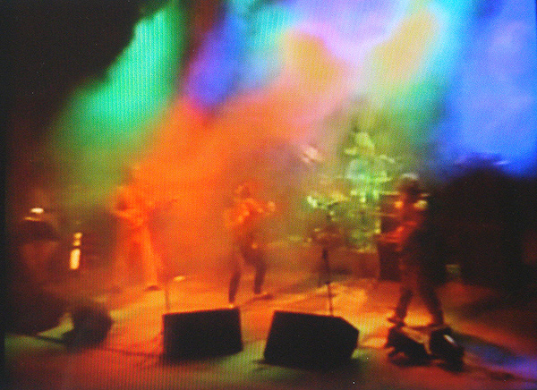 Banda Aristóteles de Ananias Jr em show no Salão de Atos da UFRGS